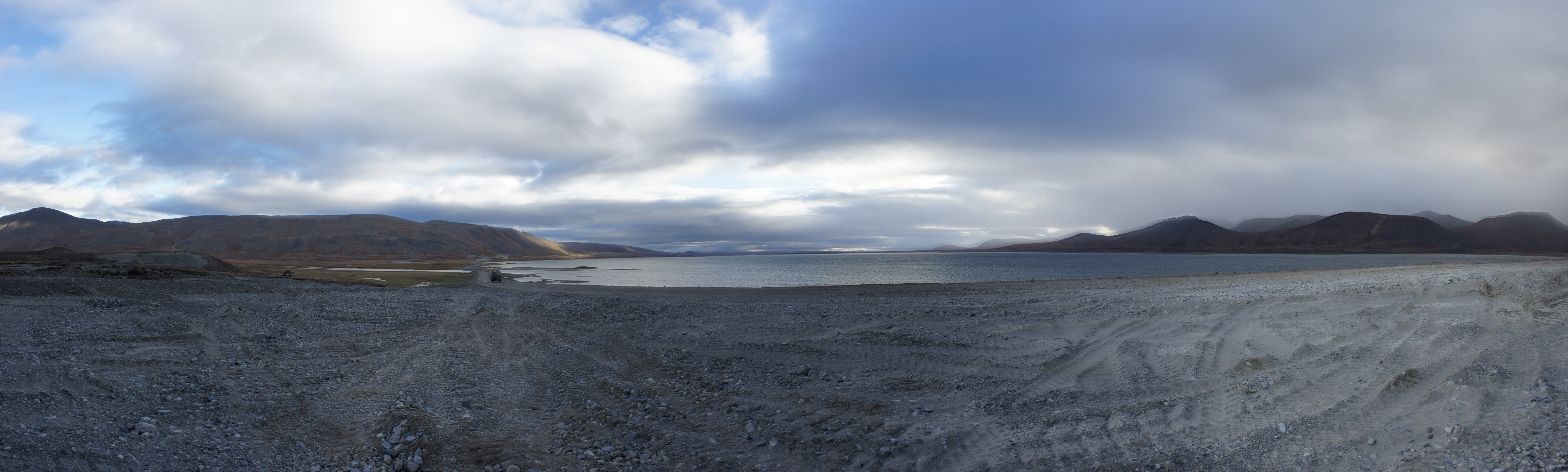 Озеро Тытыль